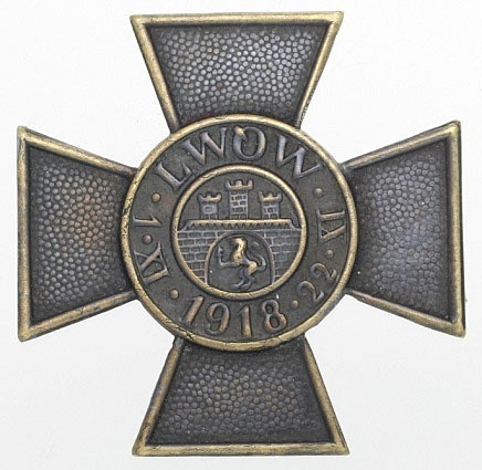 Krzyż Obrony Lwowa bez mieczy i krzyża VM. 1918